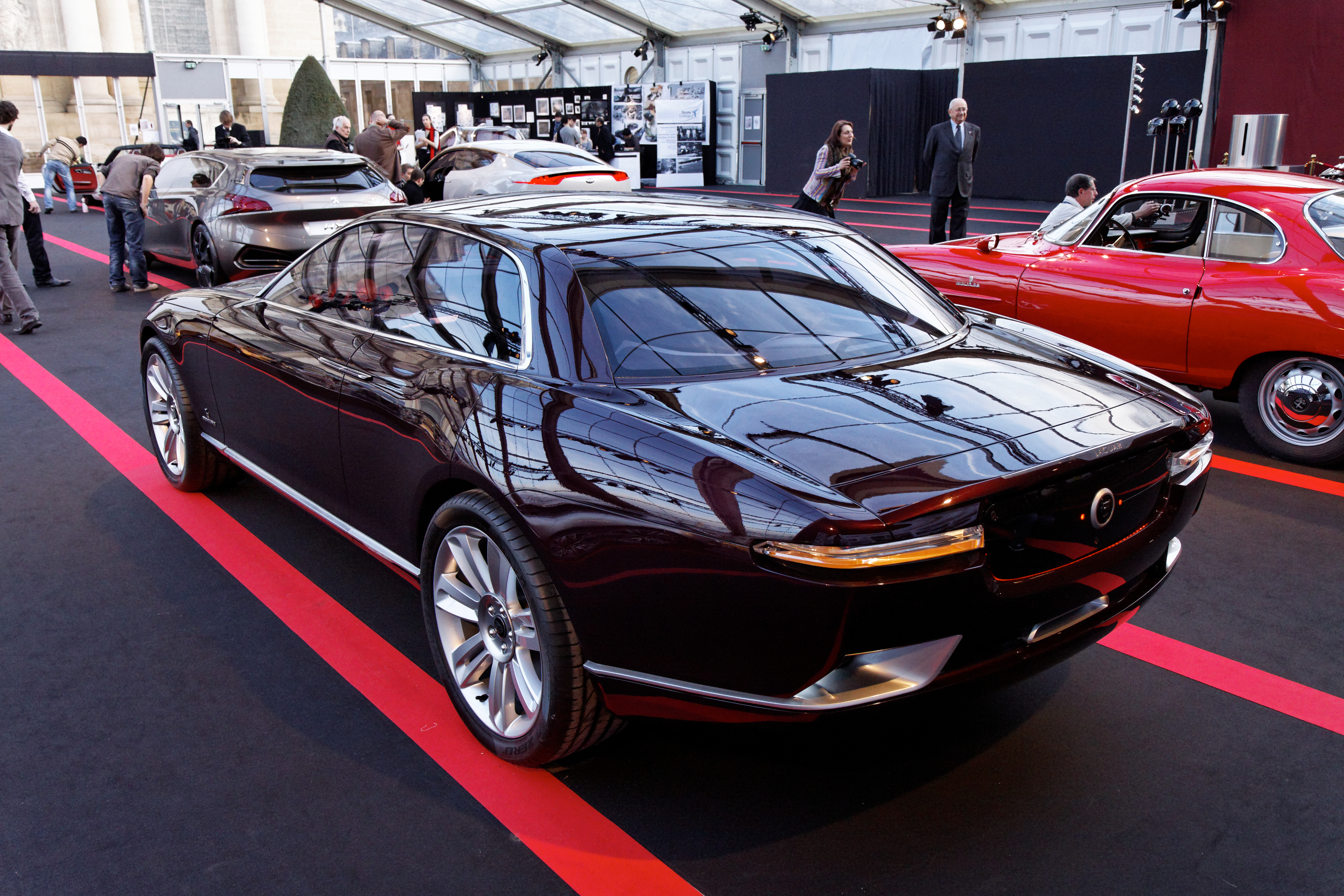 Bertone Jaguar B99